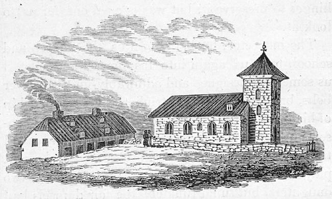 Teiknuð mynd af Bessastöðum árið 1834